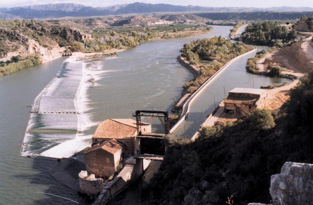 L'Assut de Xerta abans de construir la central hidroelèctrica.